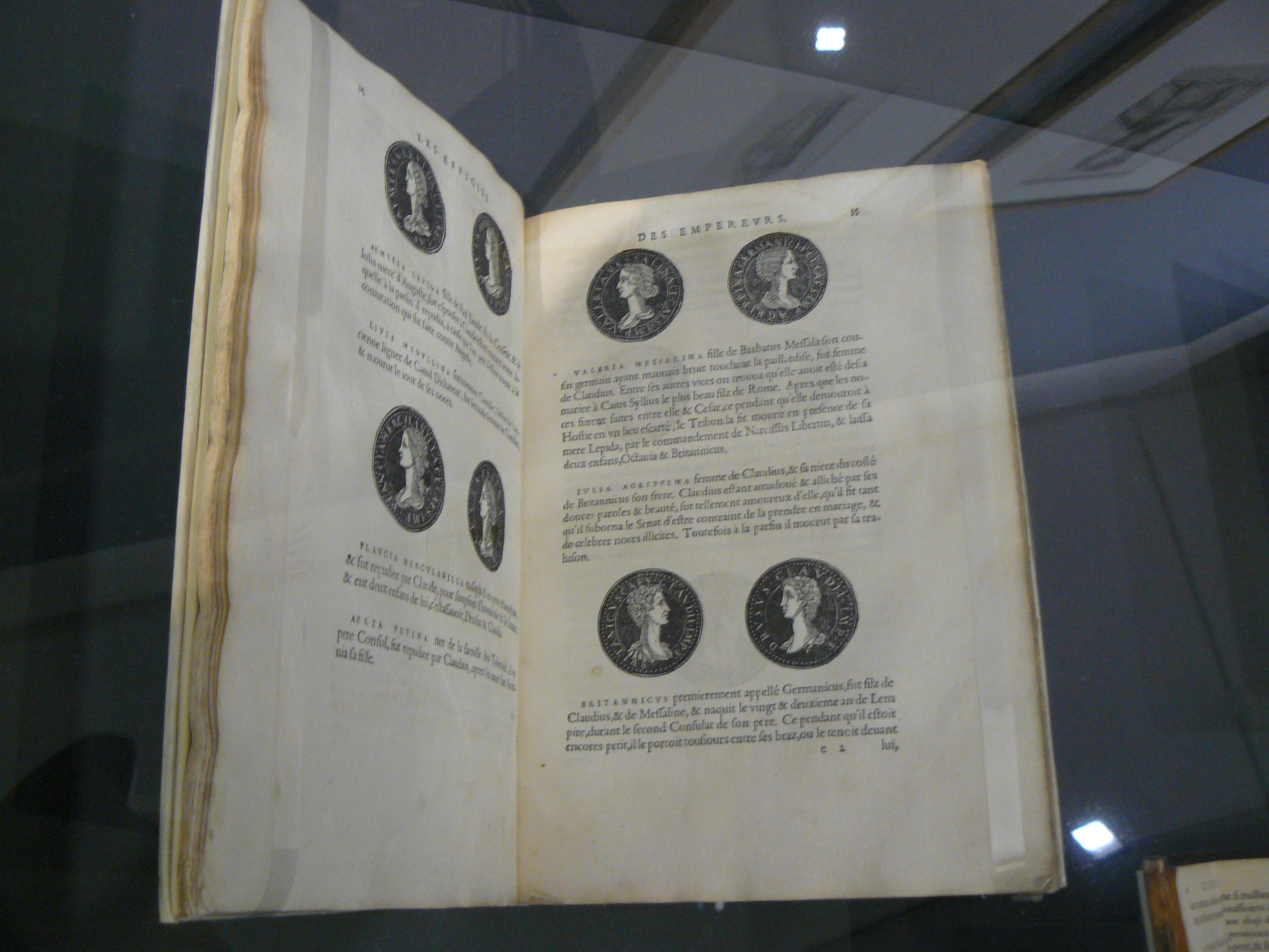 Ouvrage présenté durant l'exposition Claude, un empereur au destin singulier, catalogue 102.